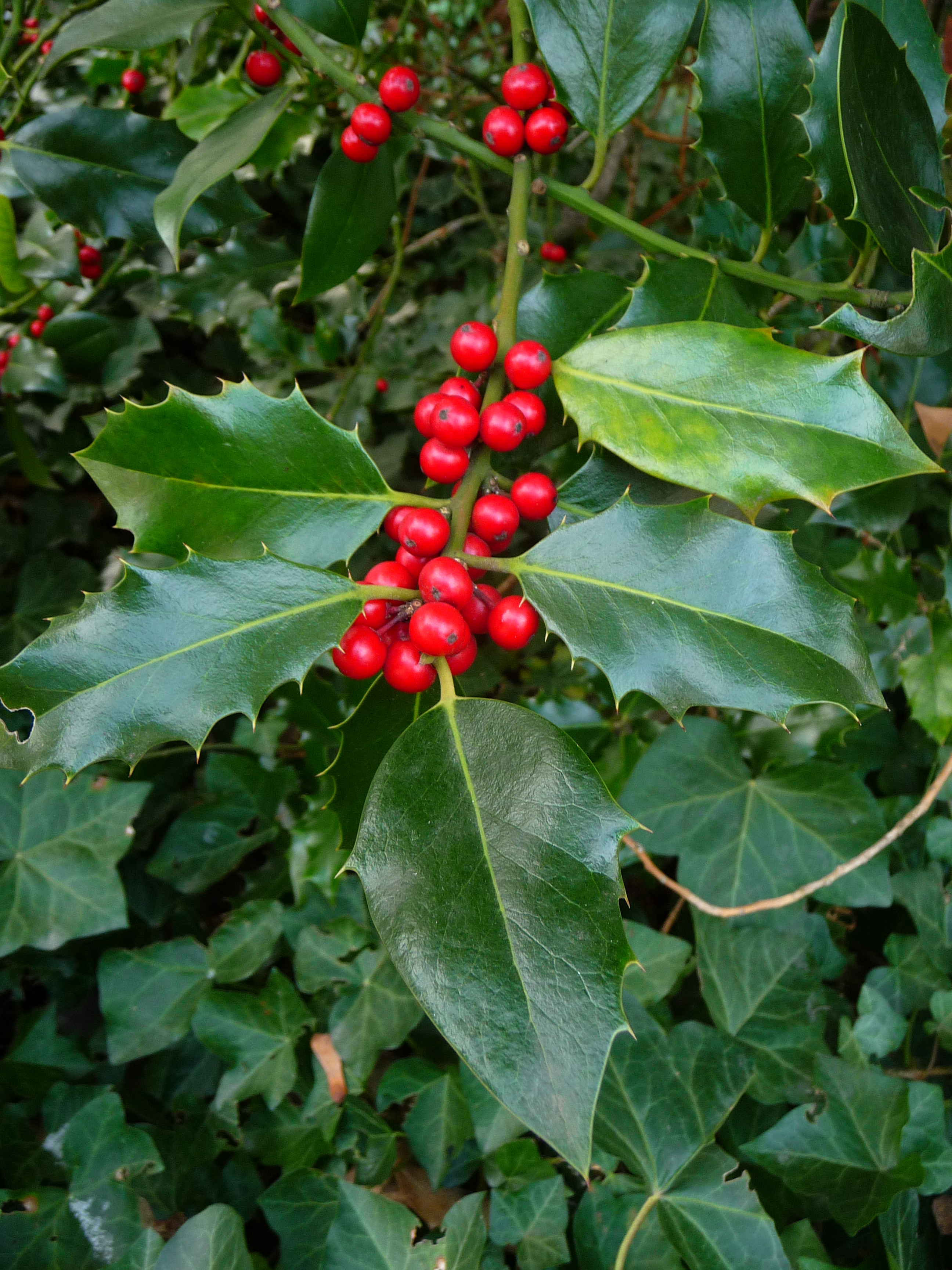 Europäische Stechpalme (Ilex aquifolium); winterharter Strauch mit roten Beeren, fotografiert in Baden-Württemberg, Deutschland